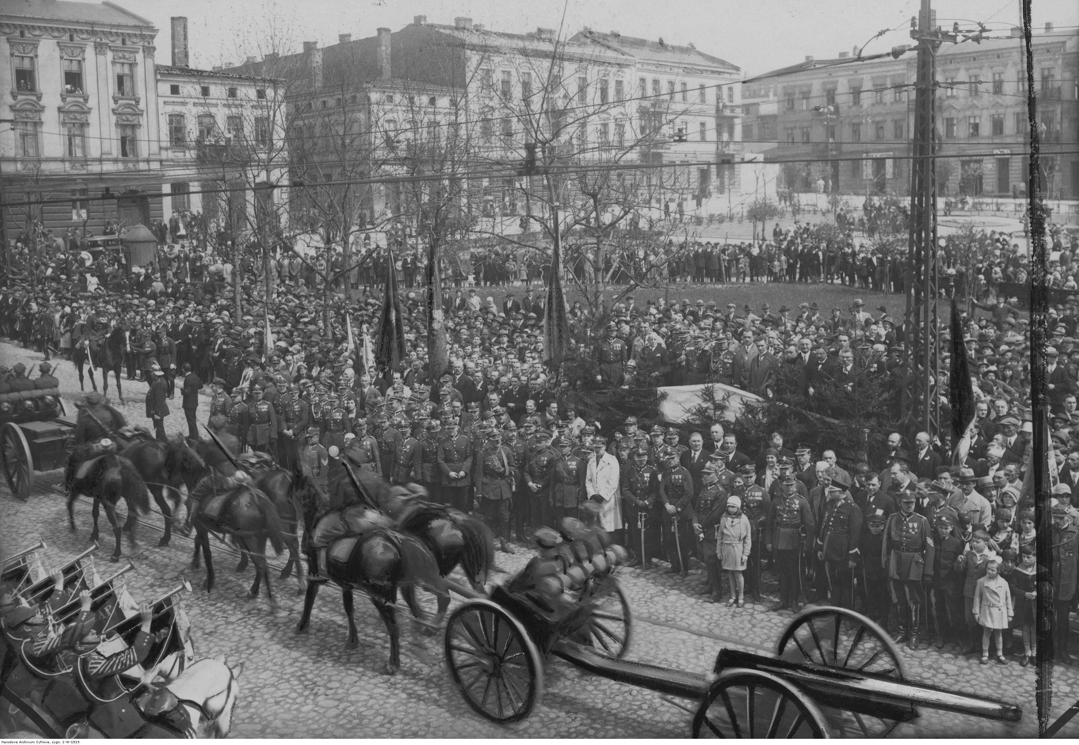 X - lecie 23 Pułku Artylerii Lekkiej w Będzinie 8 maja 1930 r. Widok ogólny na defiladę wszystkich dywizjonów pułku. Widoczni fanfarzyści u dołu fotografii. Koncern Ilustrowany Kurier Codzienny - Archiwum Ilustracji. Sygnatura: 1-W-1519